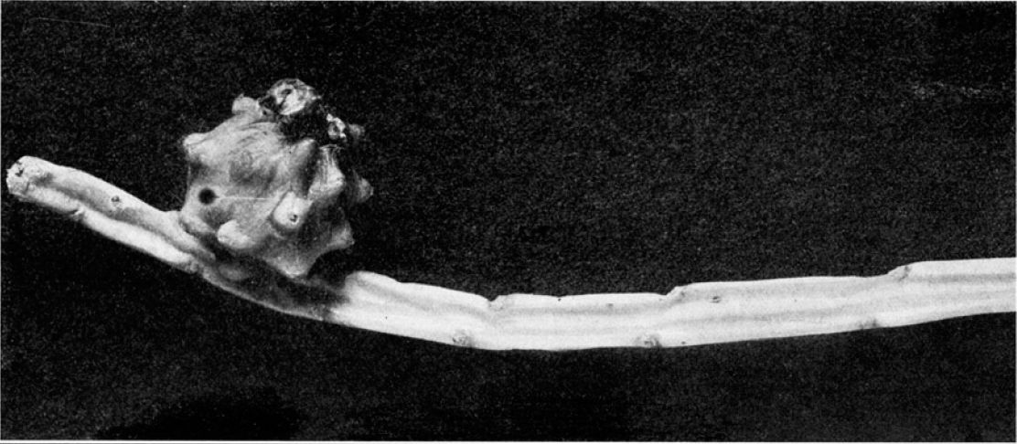 Weberocereus tunilla ssp. biolleyi (Hylocereeae; Cactaceae; Planta) Nathaniel Lord Britton és Joseph Nelson Rose "The Cactaceae" c. könyvéből Weberocereus panamensis néven